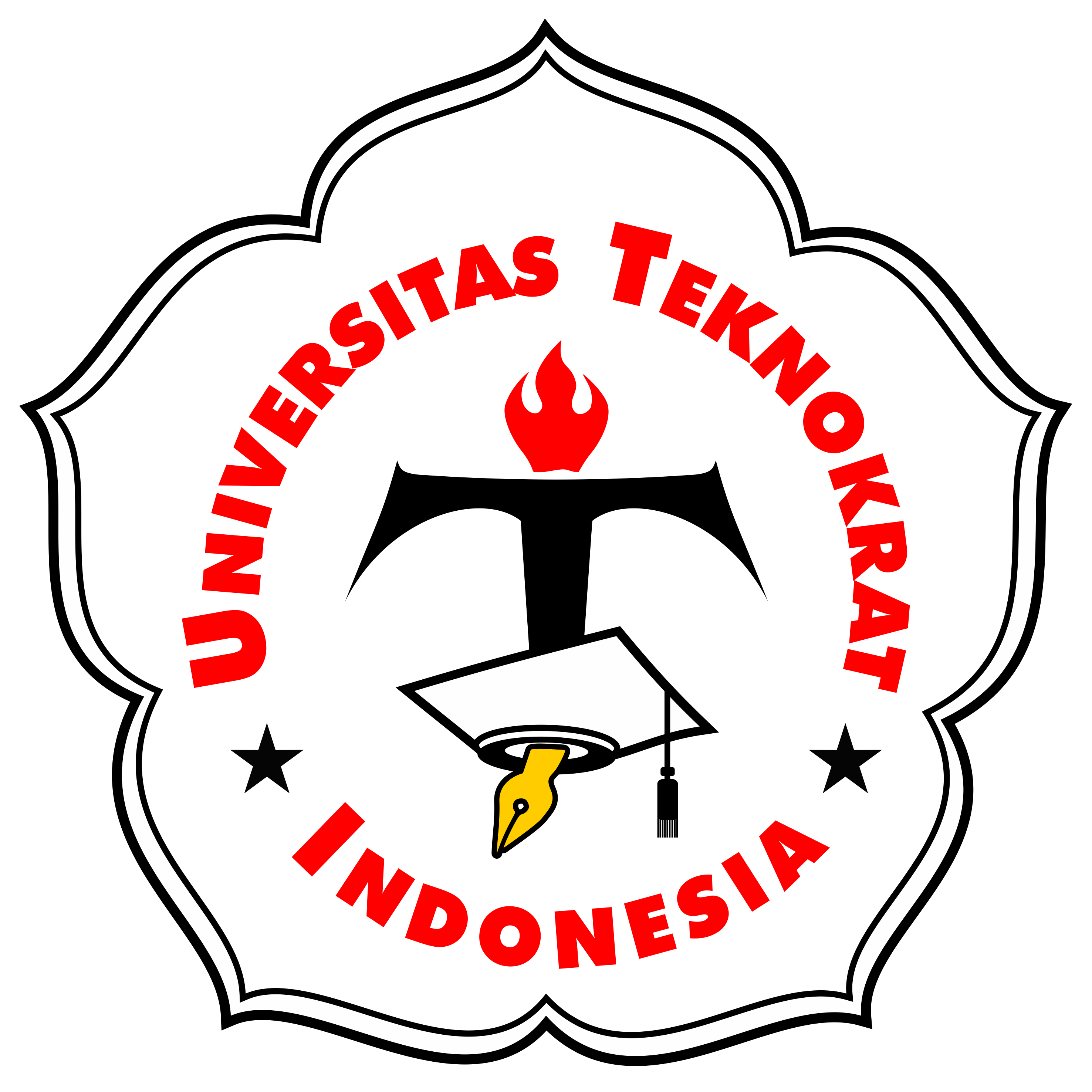 logo terbaru universitas teknokrat